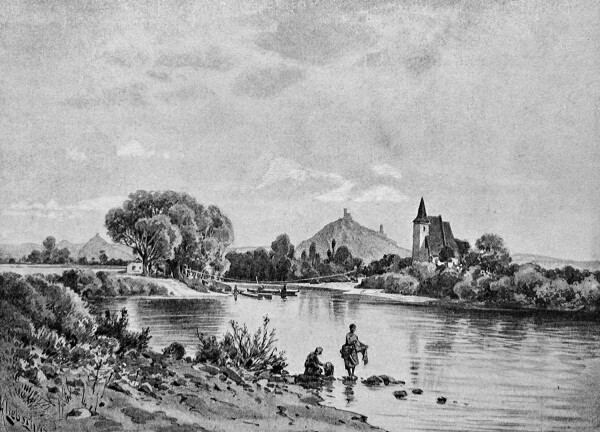 Česky: Oharka u Křesína